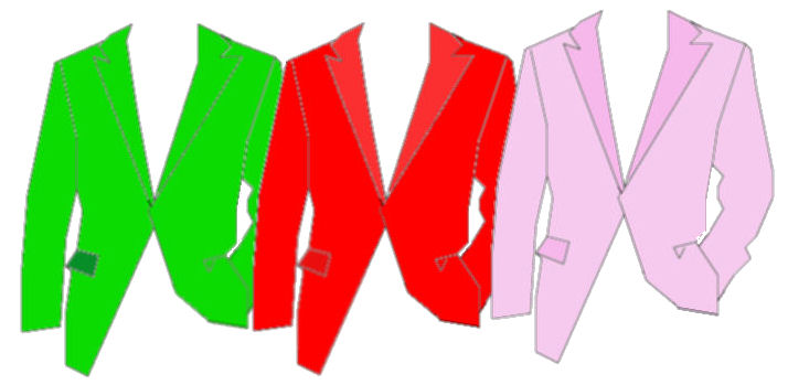 Disegno delle giacche di Lupin III. Derivato da Image:Kavaj-enkelknäppt-spetsiga-slag.png